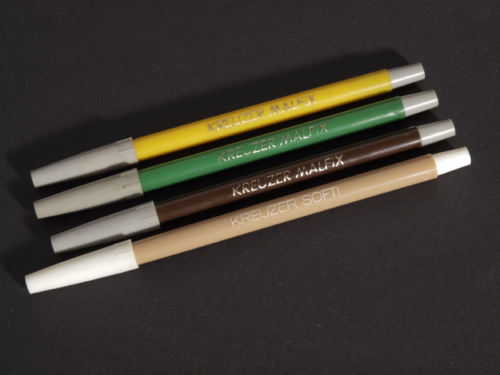 Kreuzer Malfix Faserschreiber von Kreuzer Bonn